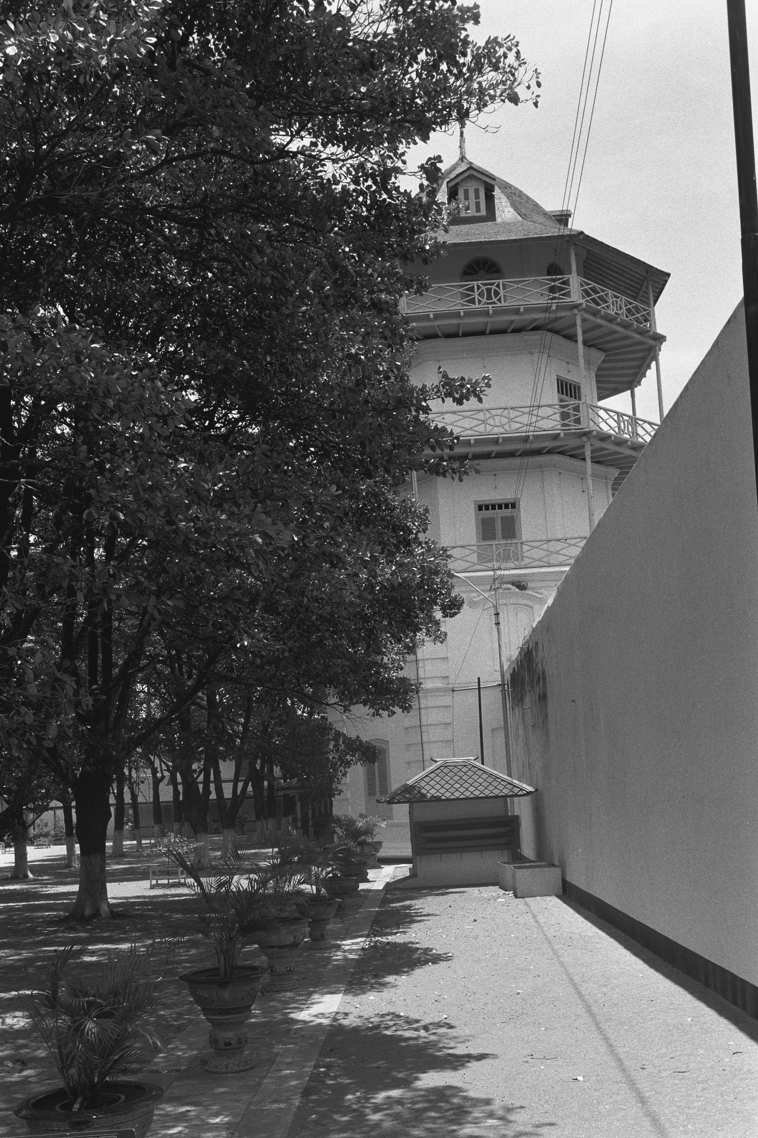 Uitkijktoren, KratonOnderwerp: uitkijktorens